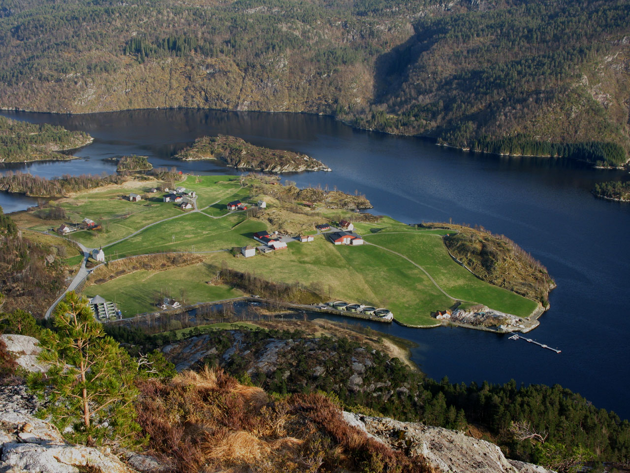 Utsikt mot Norddal frå toppen av Tjofjellet.